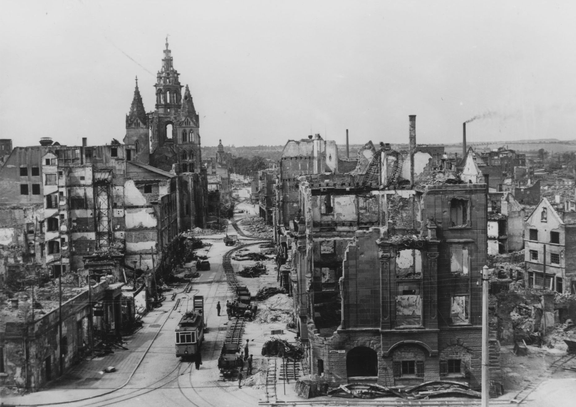 Die zerstörte Kaiserstraße in Heilbronn, 1946. Haus der Geschichte Baden-Württemberg, Sammlung Gebrüder Metz, A-2002/0069.